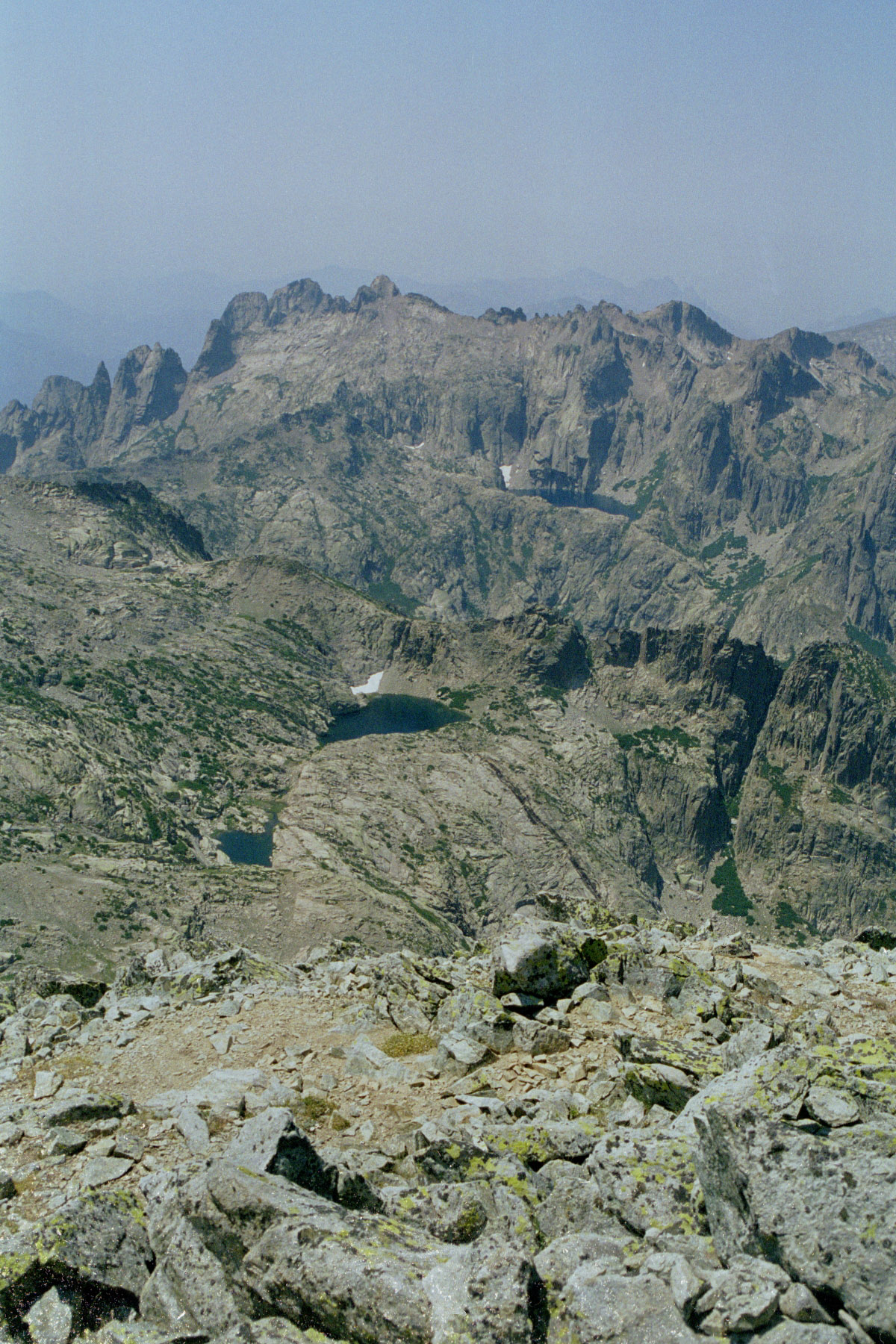 Depuis le sommet de Maniccia : Petit et grand lac du Rinoso ; au fond le lac de Capitello ; au dessus la pointe des Sept Lacs